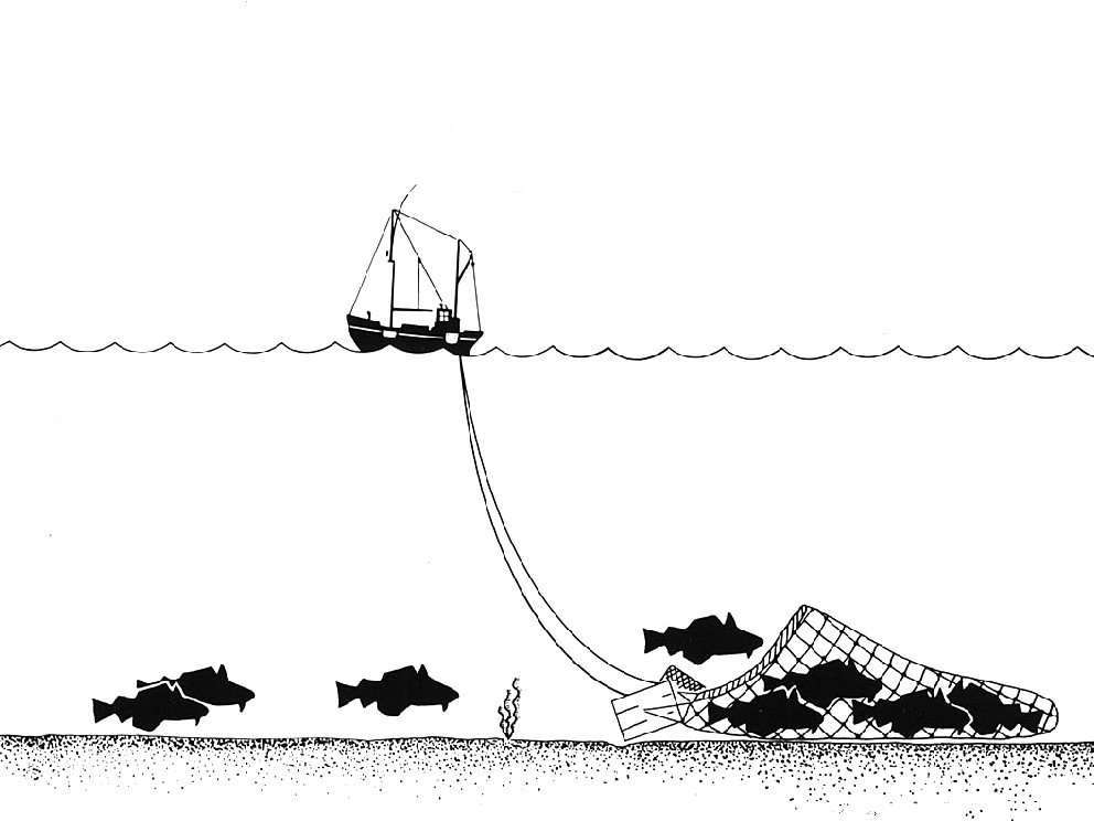 Drawing of trawling